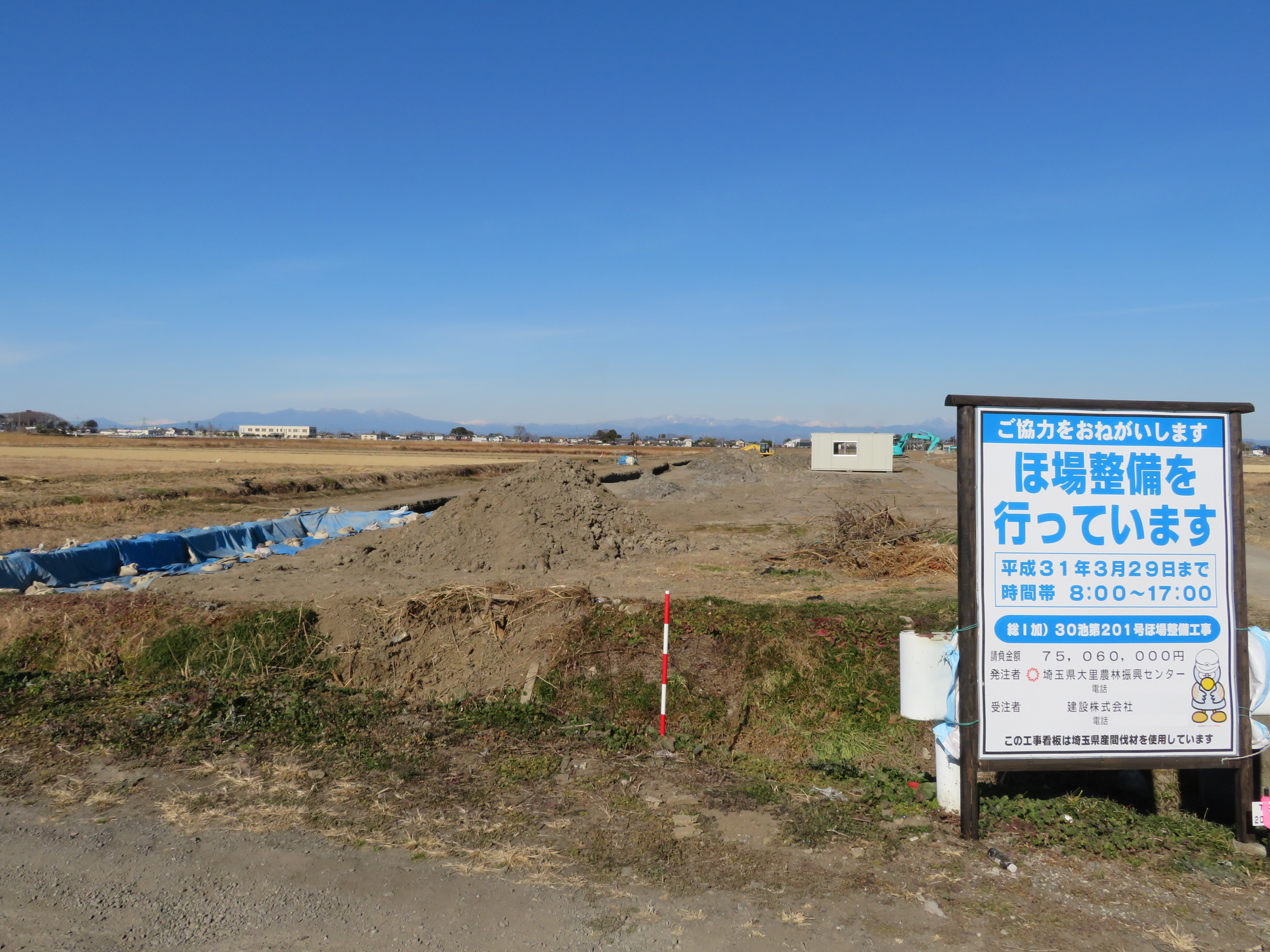 圃場 (ほじょう)整備の工事看板と圃場整備工事現場の様子（埼玉県内）（工事看板の表示を一部加工） Canon PowerShot SX720 HS